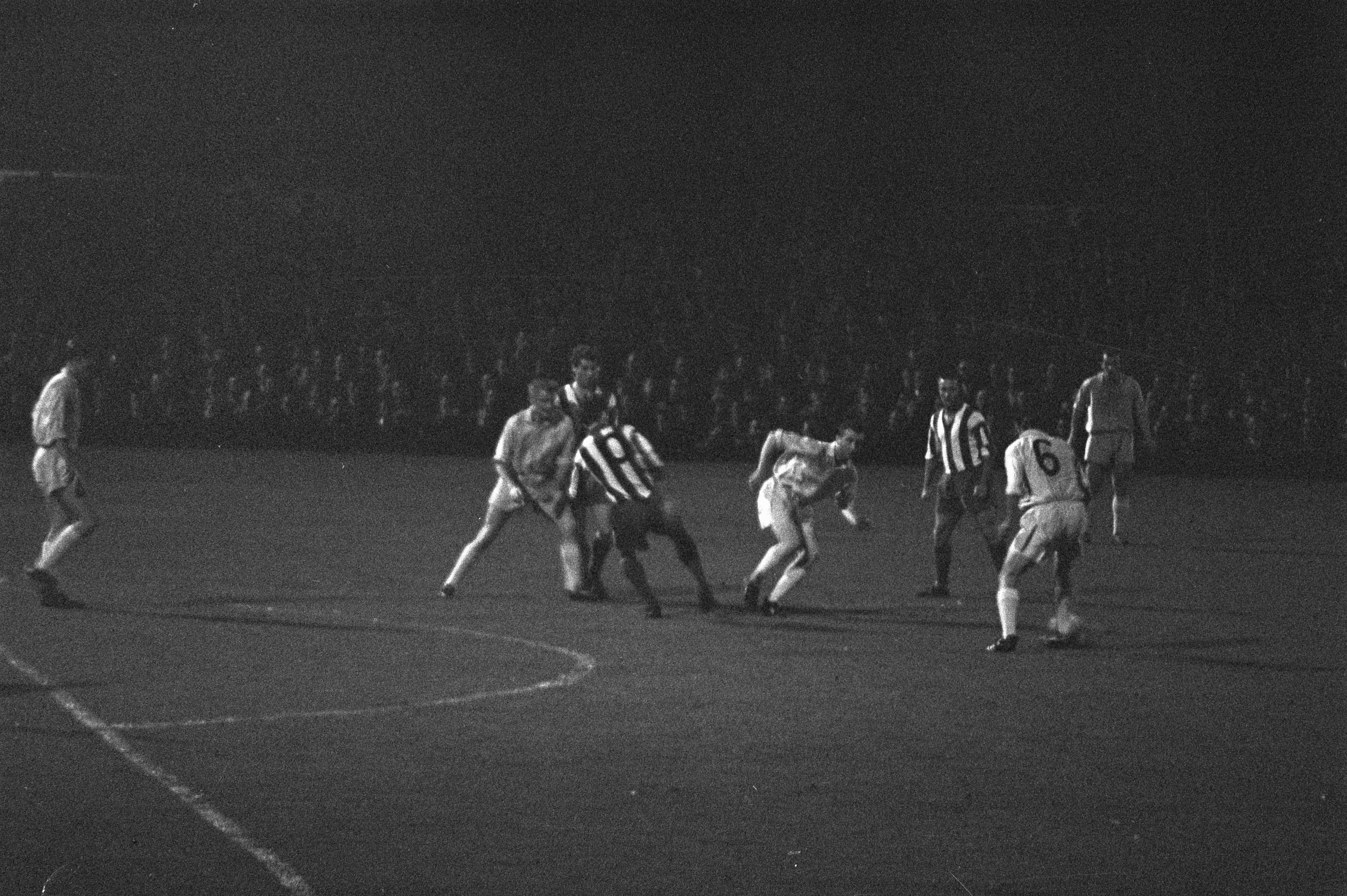 Collectie / Archief : Fotocollectie Anefo Reportage / Serie : [ onbekend ] Beschrijving : Nederlands Bondselftal tegen Saarland 4-1, spelmoment voor Saarlanddoel Datum : 23 september 1959 Trefwoorden : Bondselftallen Fotograaf : Pot, Harry / Anefo Auteursrechthebbende : Nationaal Archief Materiaalsoort : Negatief (zwart/wit) Nummer archiefinventaris : bekijk toegang 2.24.01.05 Bestanddeelnummer : 910-6973